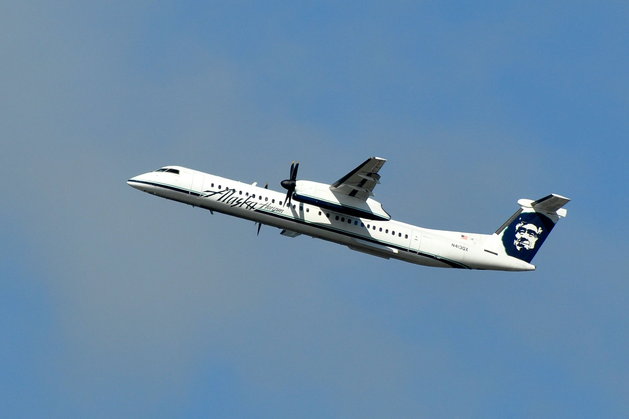 MSN 4060 DASH 8 / DHC-8 401 HORIZON AIR / ALASKA AIRLINES SEA AIRPORT